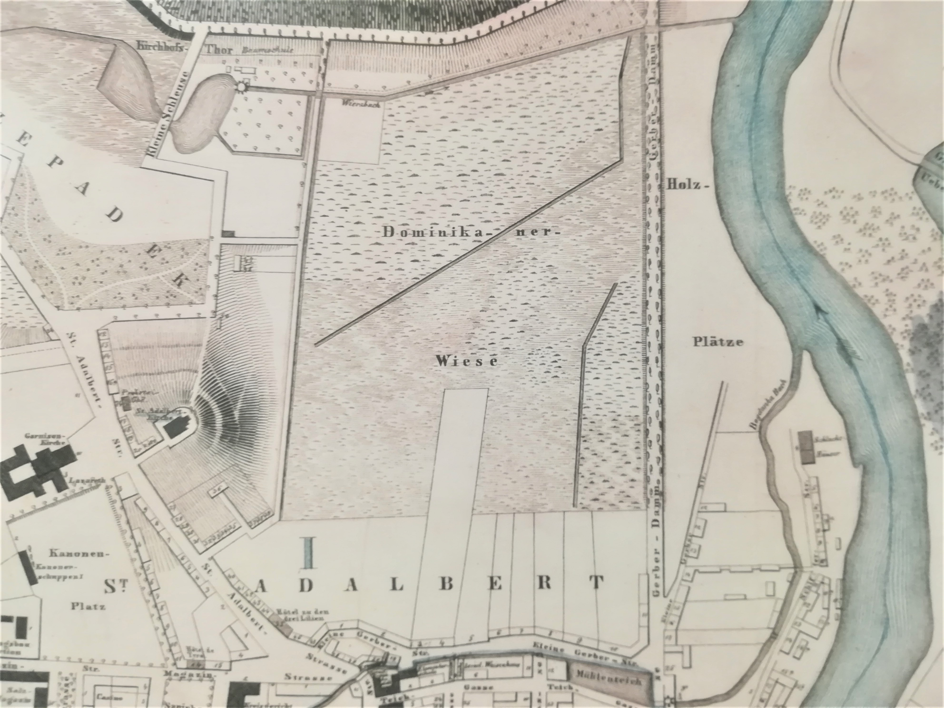 Mapa Corvinusa - Poznań, 1856 r.